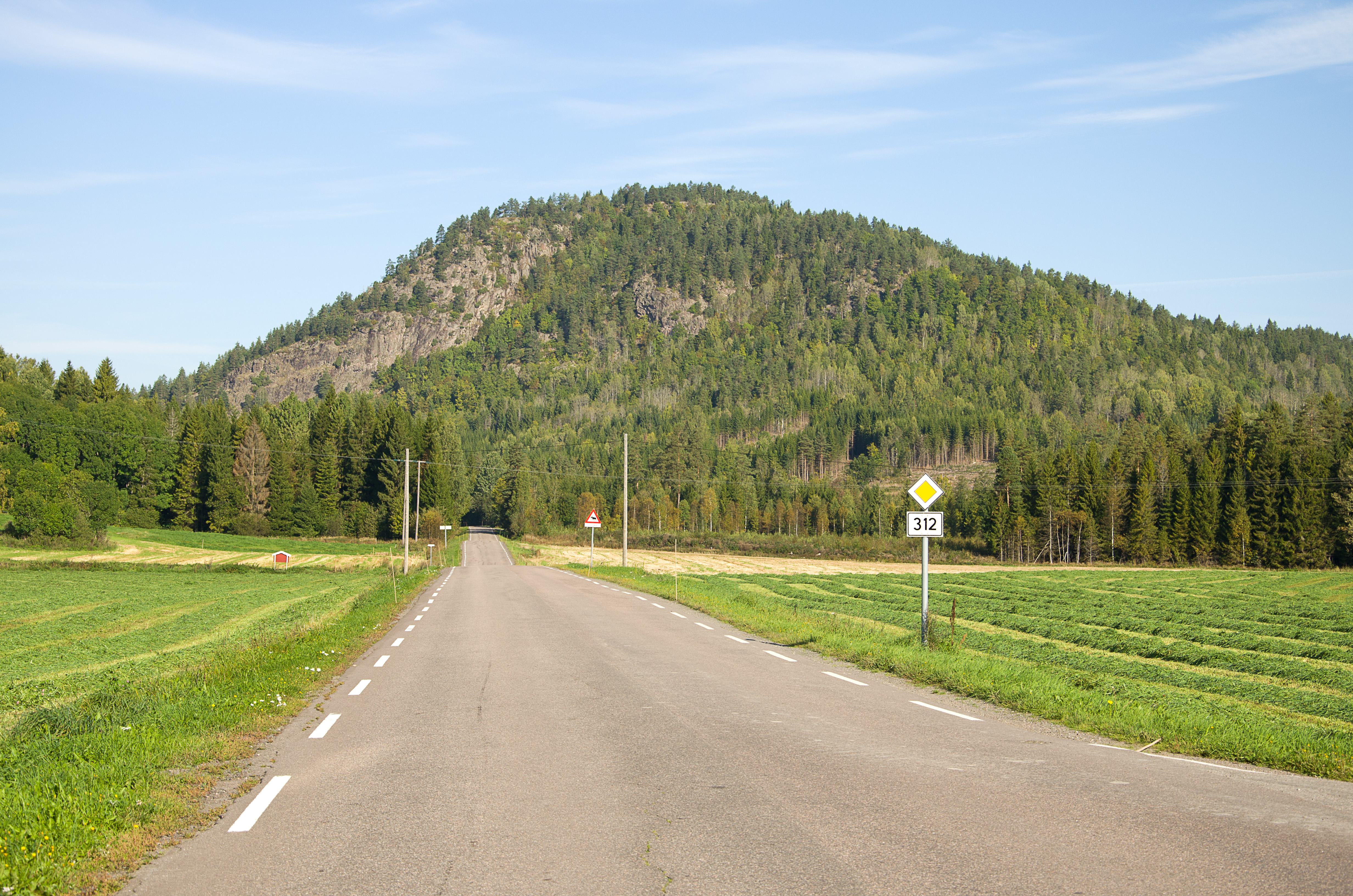 Fylkesvei 312 Vivestadlinna med Lønskollen i bakgrunnen